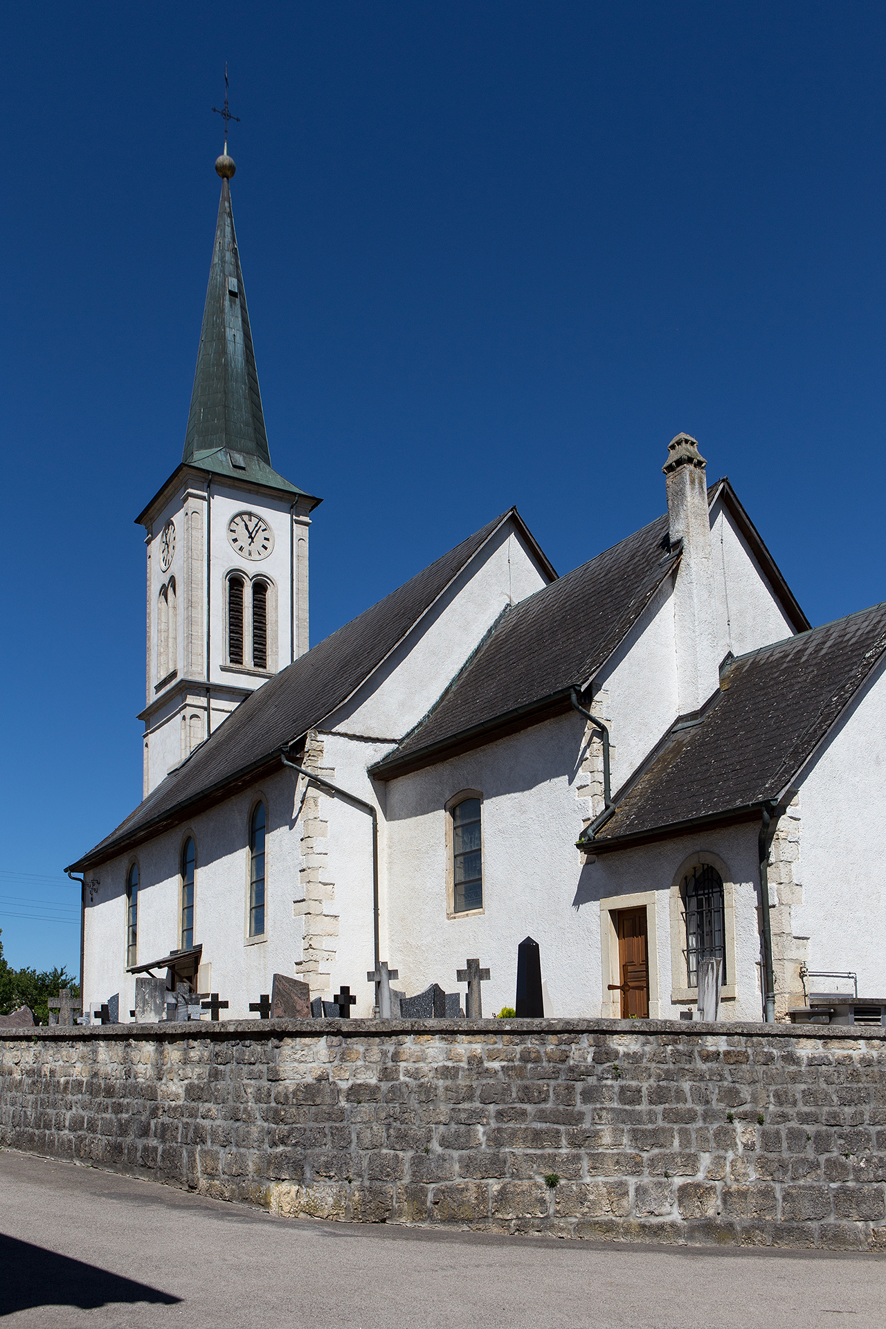 Kirche in Montignez (JU)